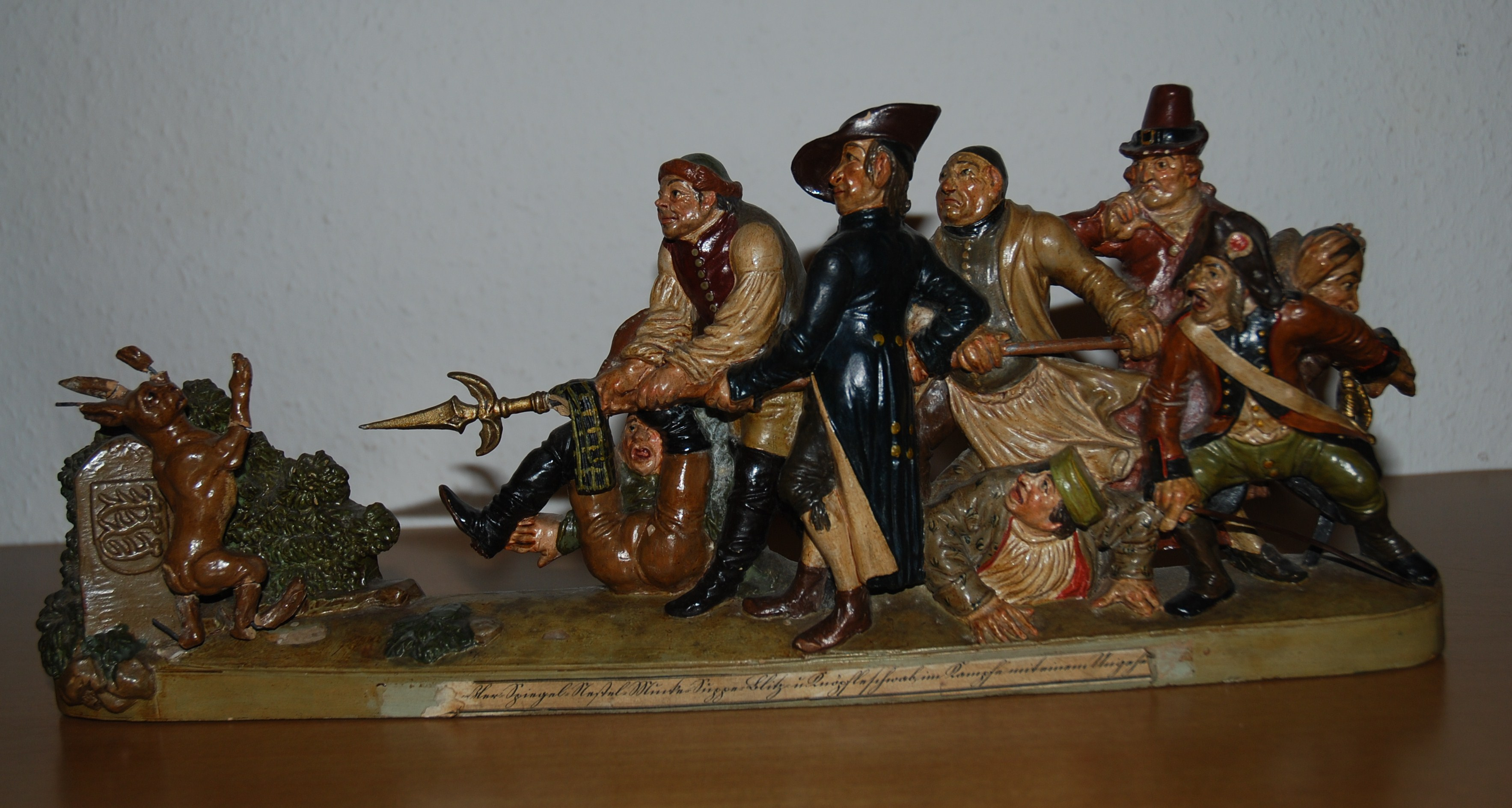 Terrakottafiguren von Anton Sohn (1769-1840), Zizenhausen, 19.Jahrhundert, "Die 7 Schwaben", dargestellt mit 8 Personen, Privatbesitz, Graz (A)